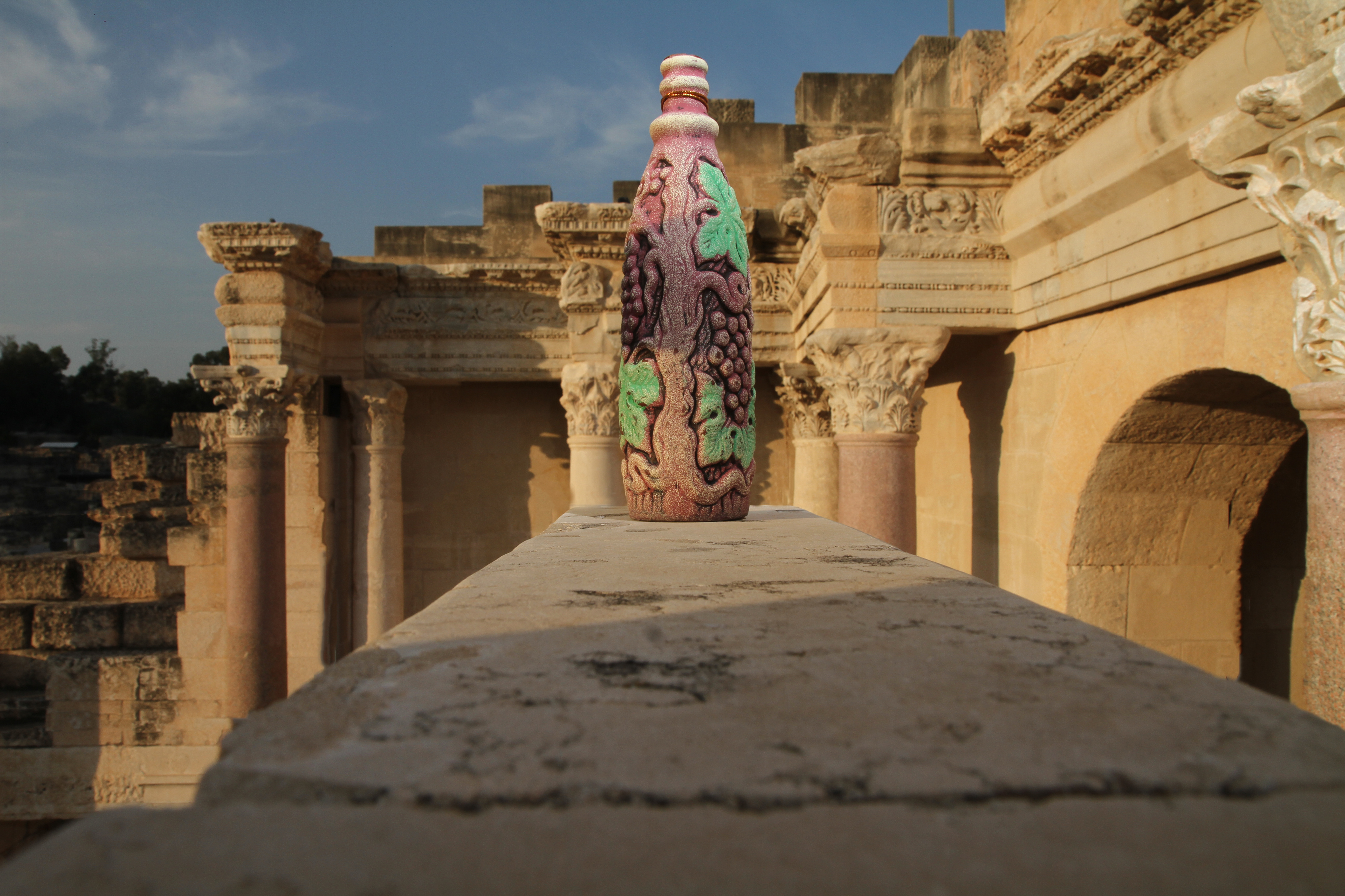 יין גאורגי